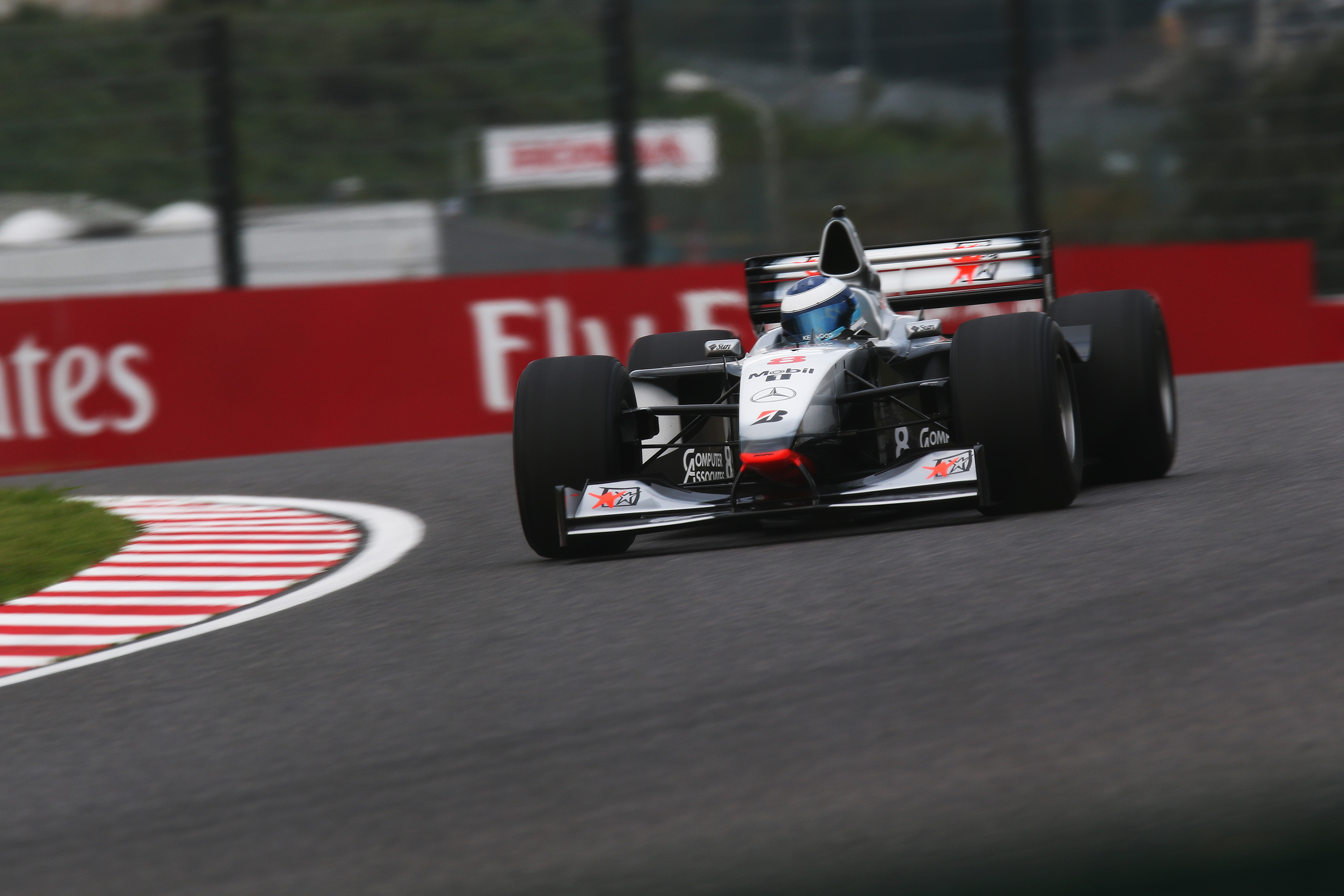 Mika Häkkinen McLaren MP4 13 2018 Japanese Grand Prix.